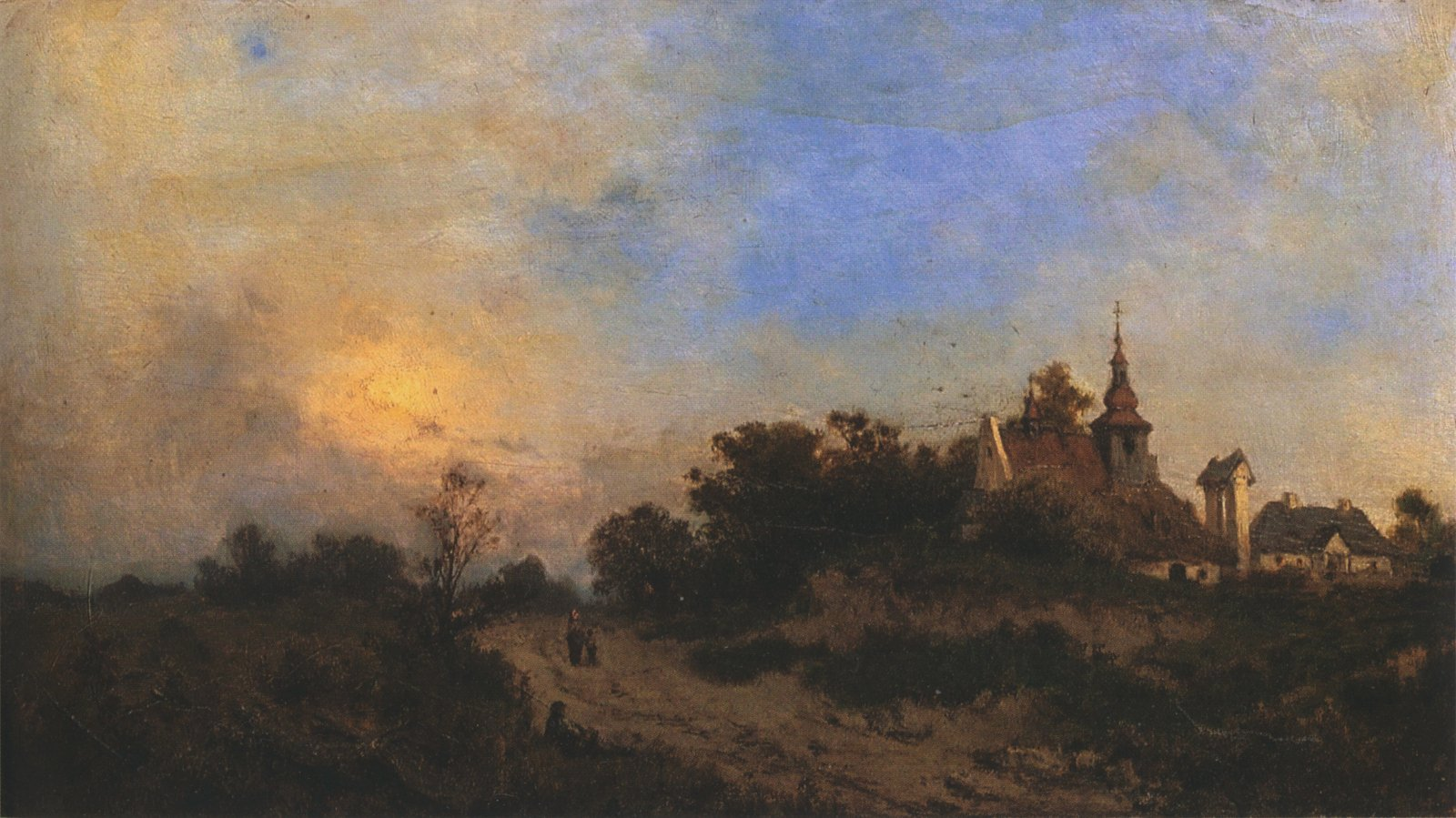 Landscape